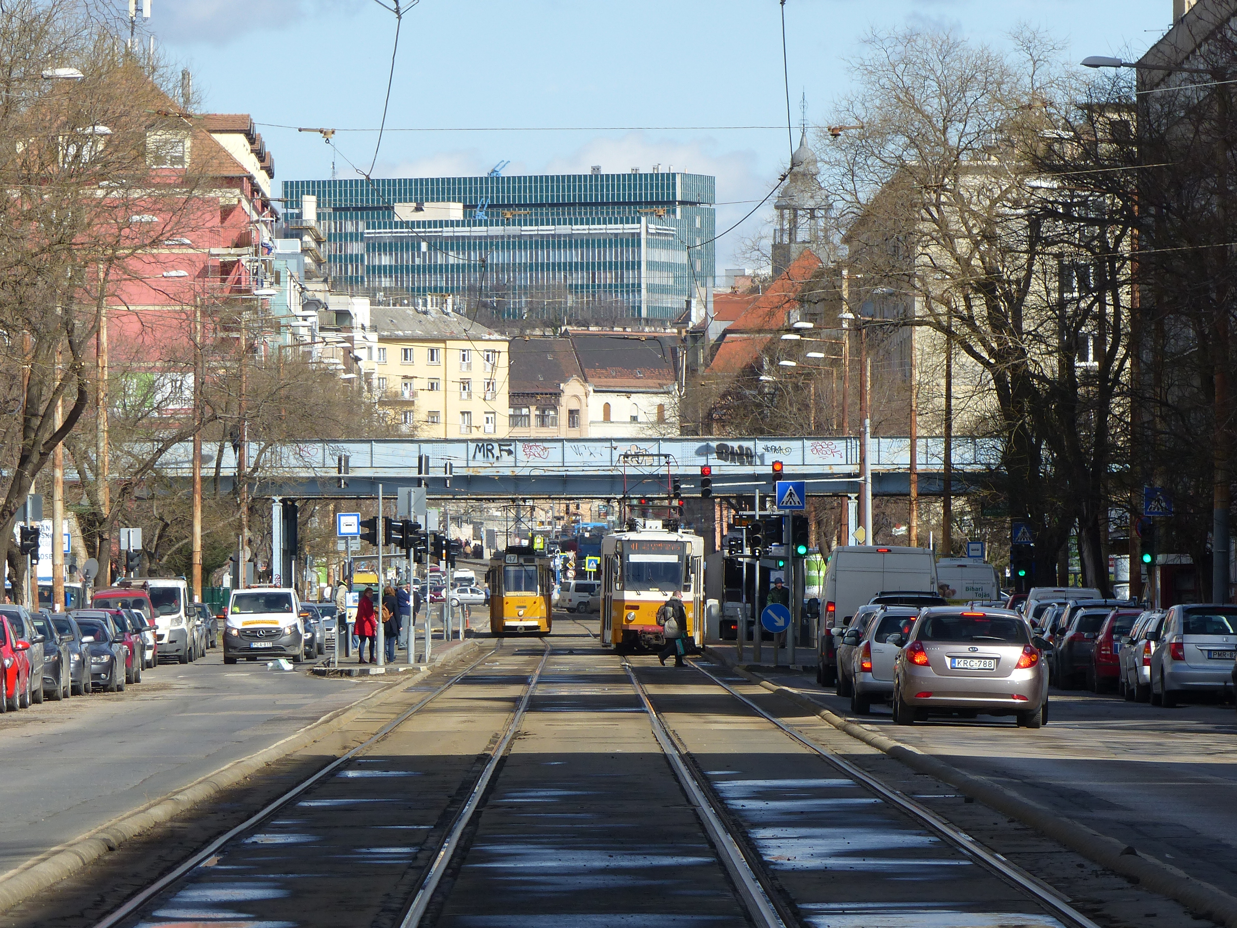 Lágymányos, Fehérvári út.